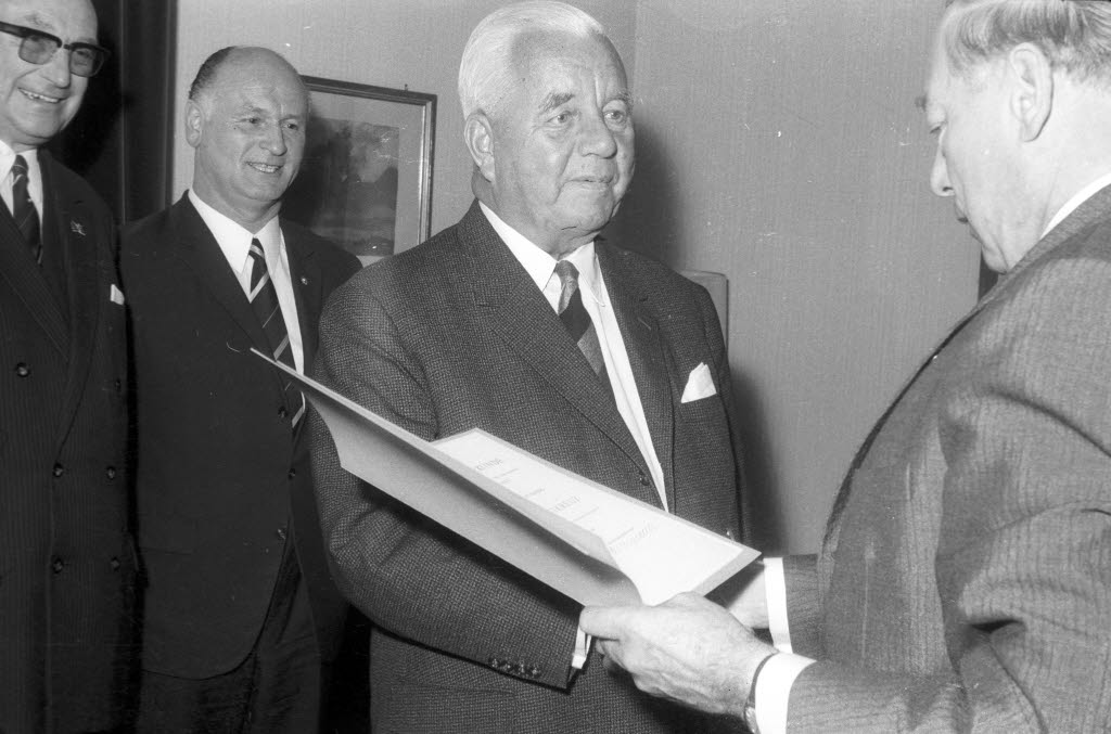 Ministerpräsident Dr. Helmut Lemke überreicht es ihm für Verdienste um die schleswig-holsteinische Wohnungswirtschaft und Politik. 2. v.l. Landessozialminister Otto Eisenmann.